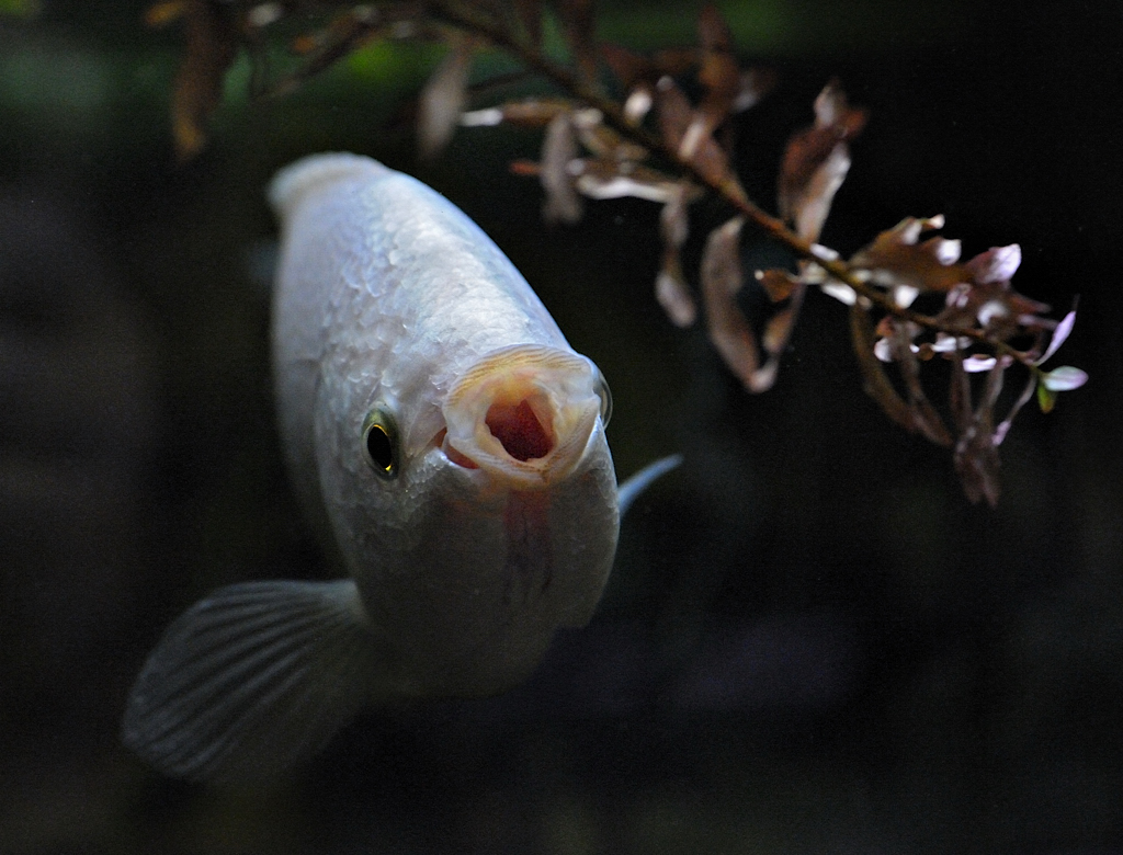 Helostoma temminkii in an aquarium.